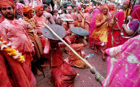 Braj Lath mar Holi at Barasana, India.